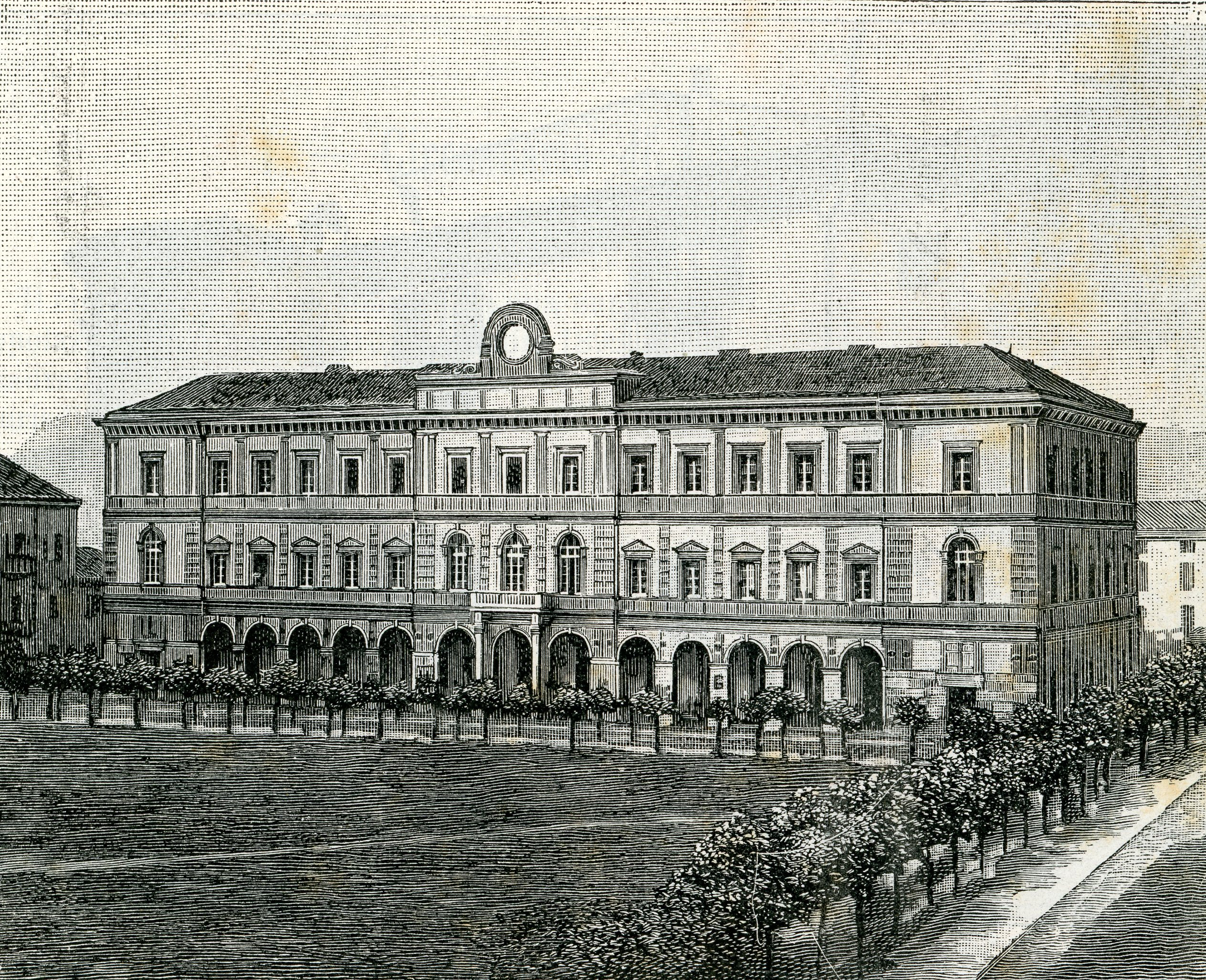 Campobasso: palazzo municipale (incisore anonimo 1898).